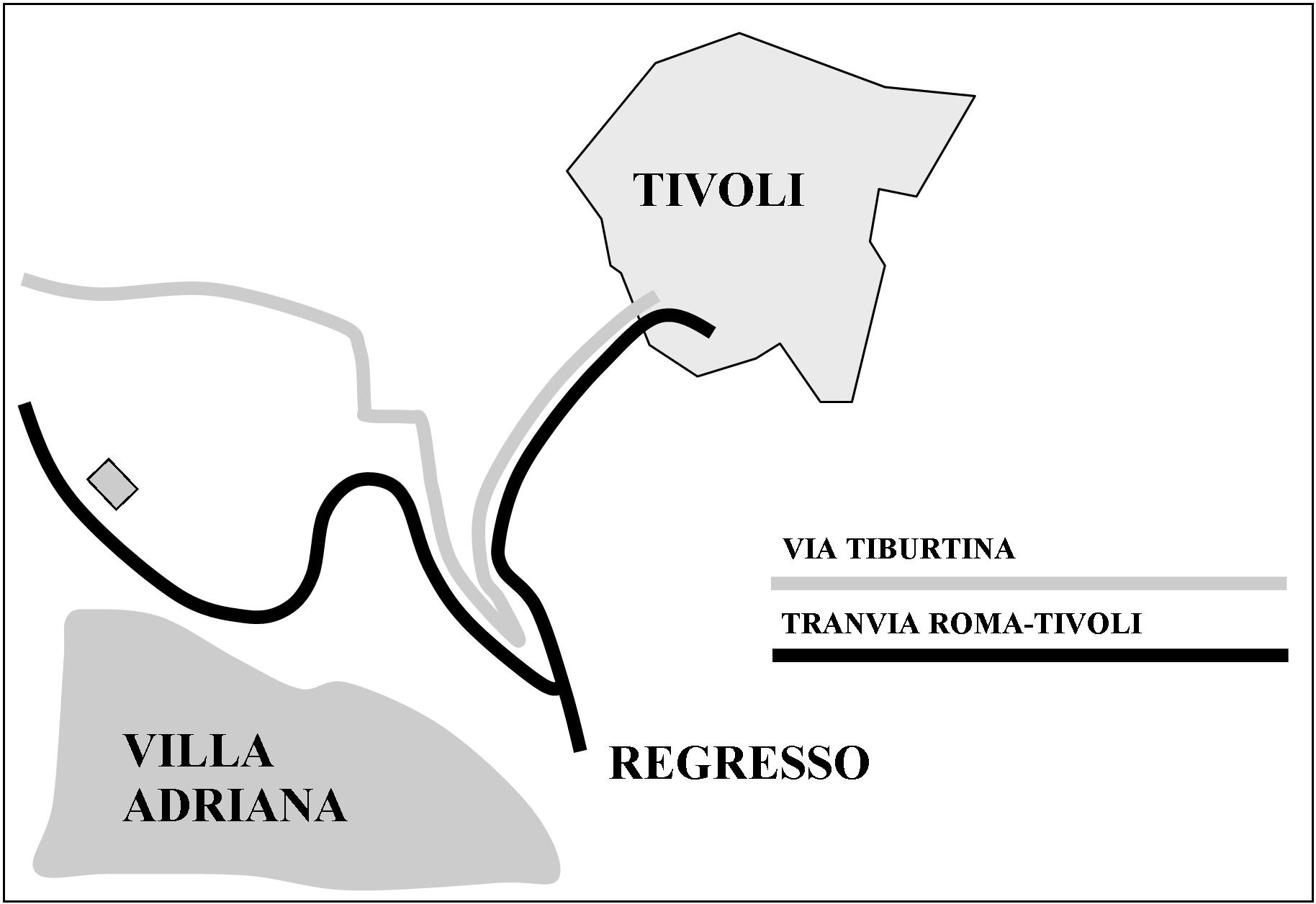 Località regresso, via Tiburtina